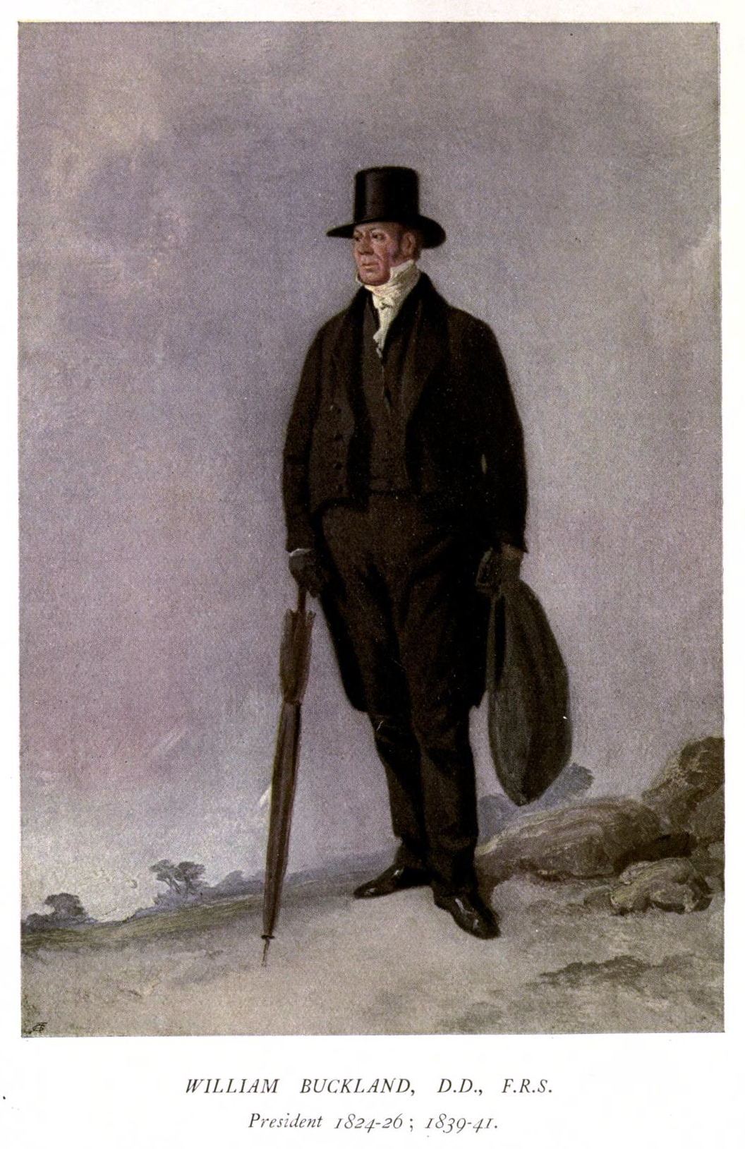 William Buckland DD FRS (12 March 1784 – 14 August 1856)